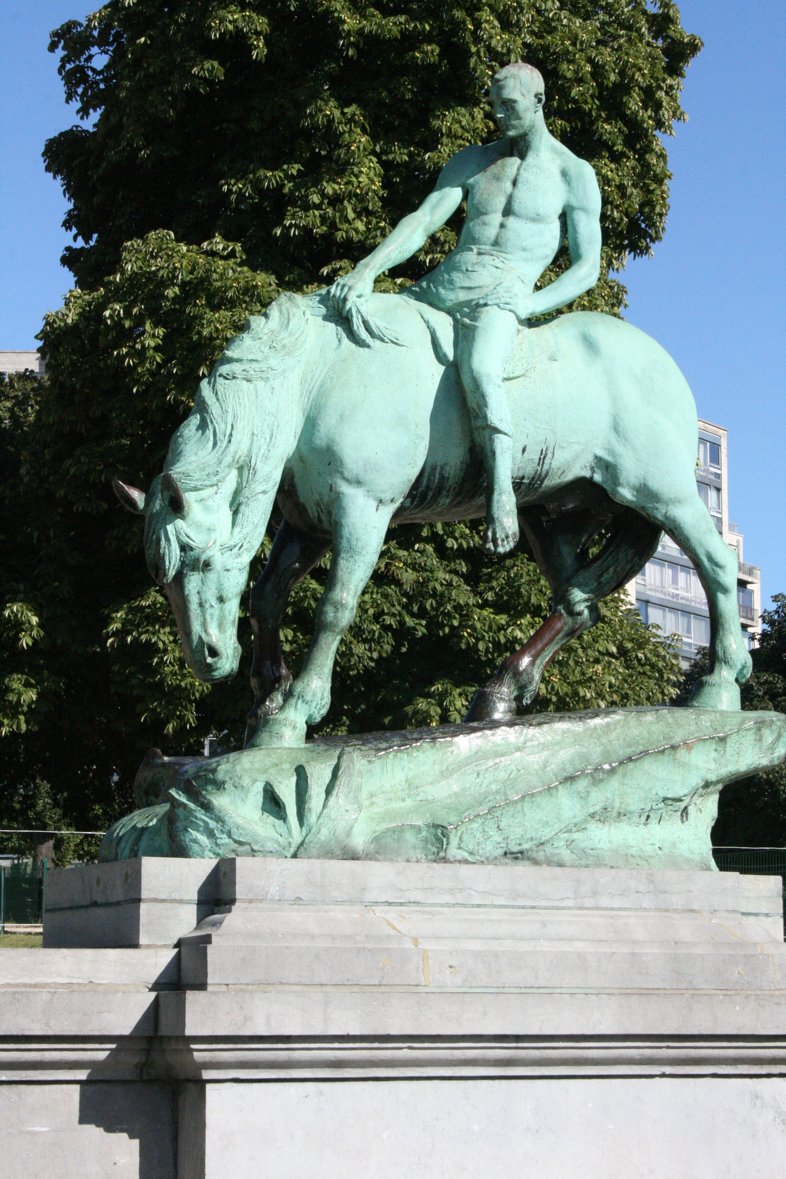 Square Ambiorix, Bruxelles, Belgique. Satue "Cheval à l'abreuvoir" ( 1899 ) de Constantin Meunier (1831-1905)